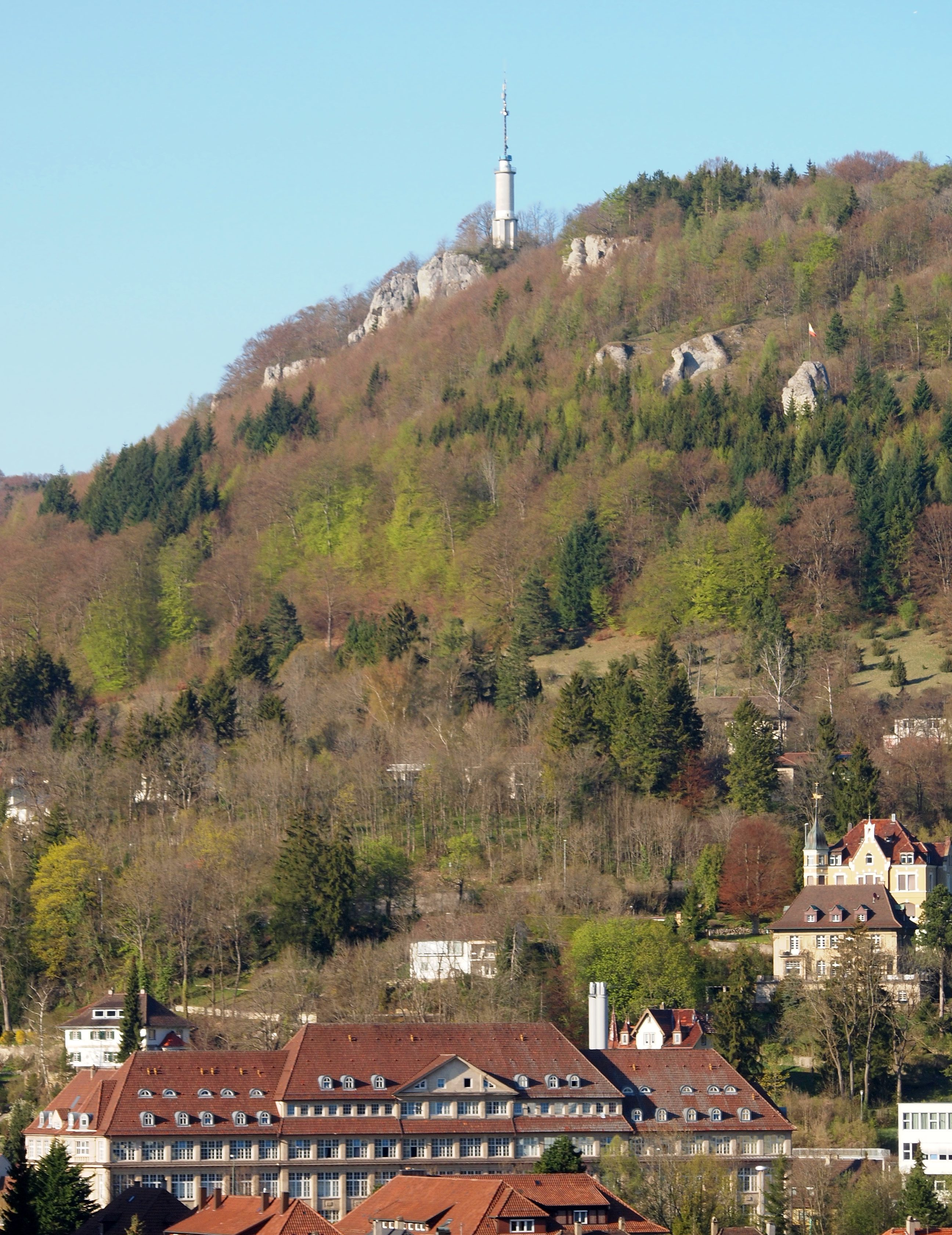 Ebingen, Schlossfelsenturm, Fahnenfelsen und Fabrikgebäude Haux